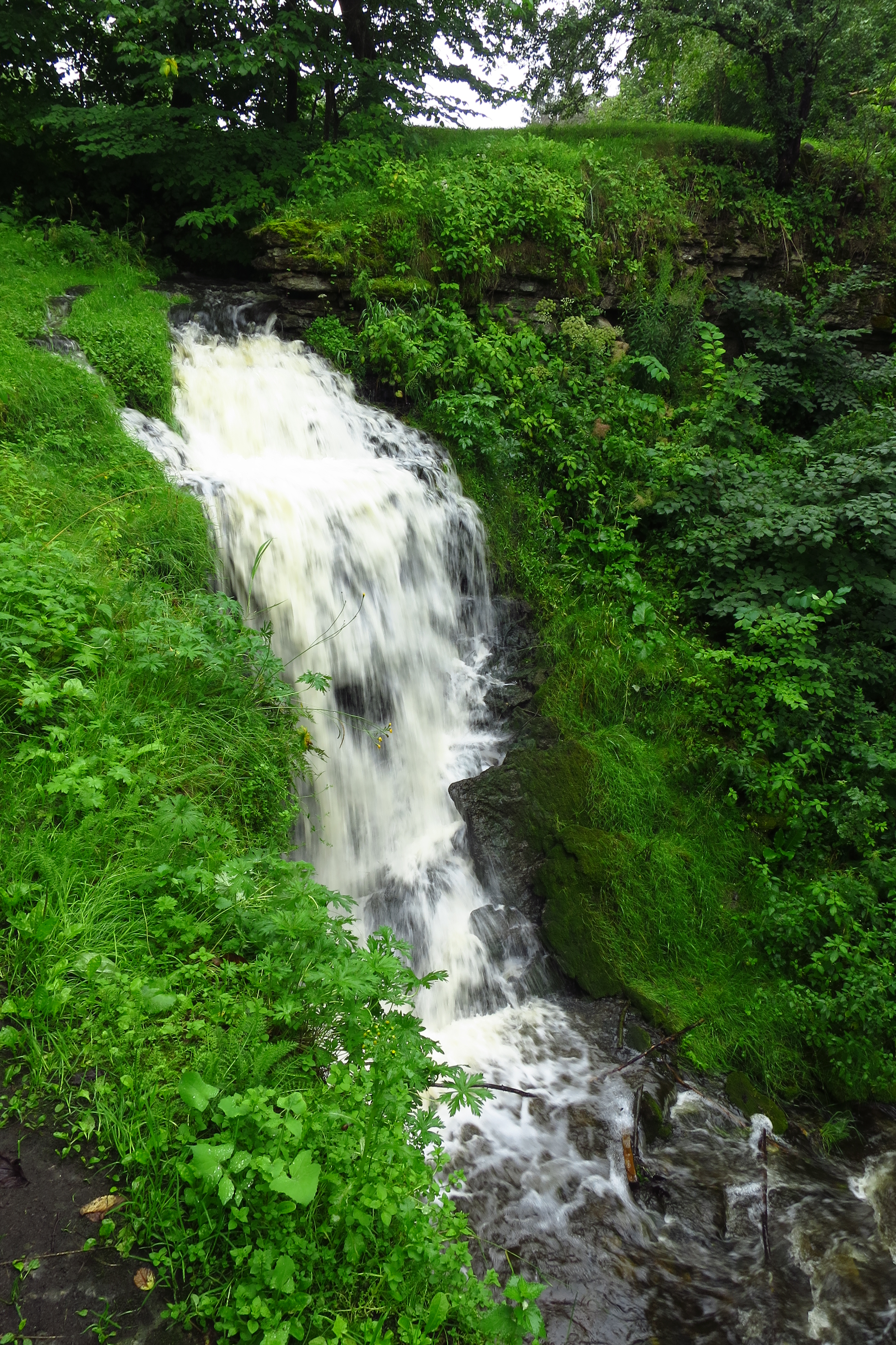 Lagnevoja juga